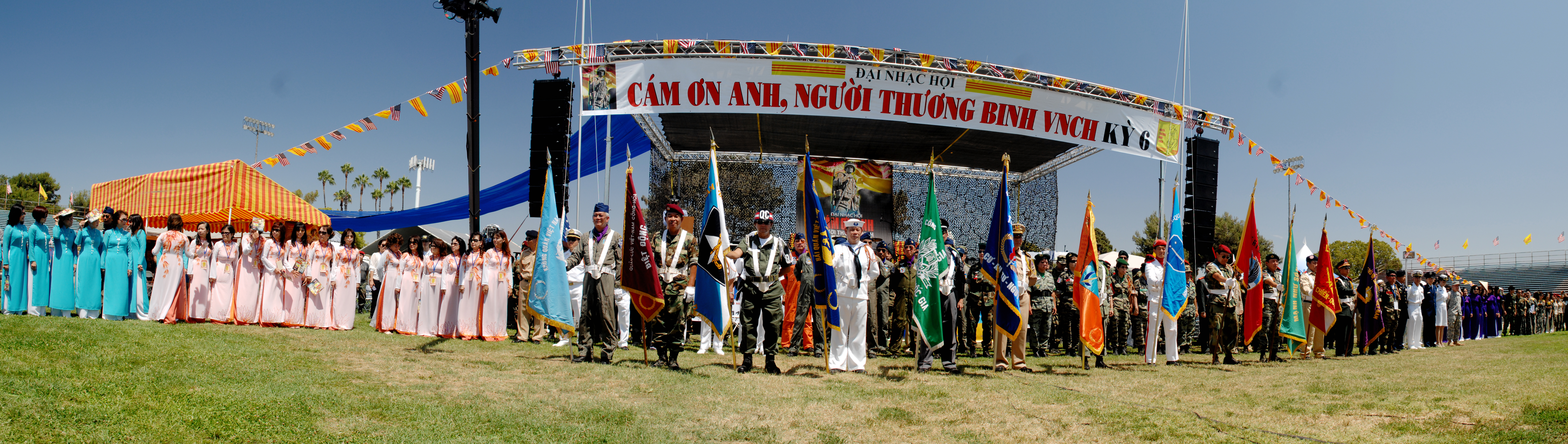 Flags of the Republic of Vietnam Military Forces (Quân lực Việt Nam Cộng hòa) in 12nd August 2012.